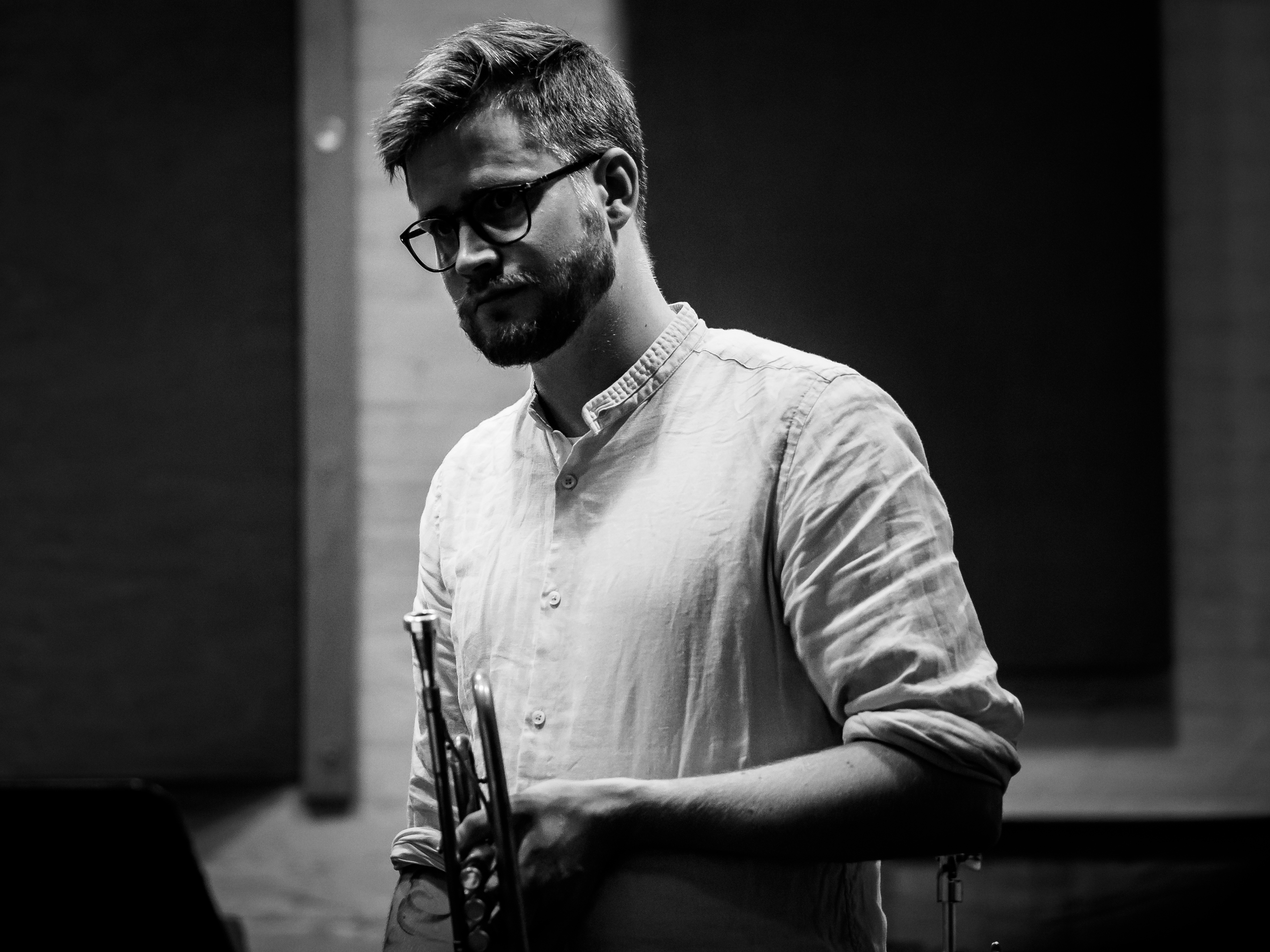 Foto: Peter Gannushkin, New York 2017